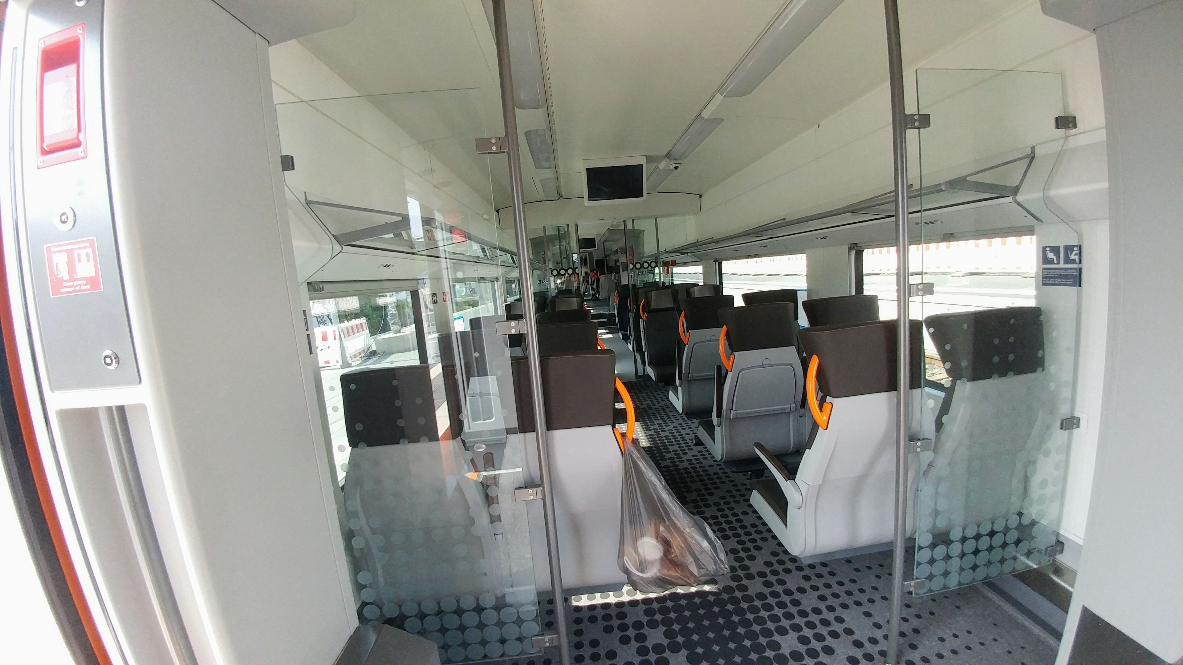 Die 2. Klasse des RRX.